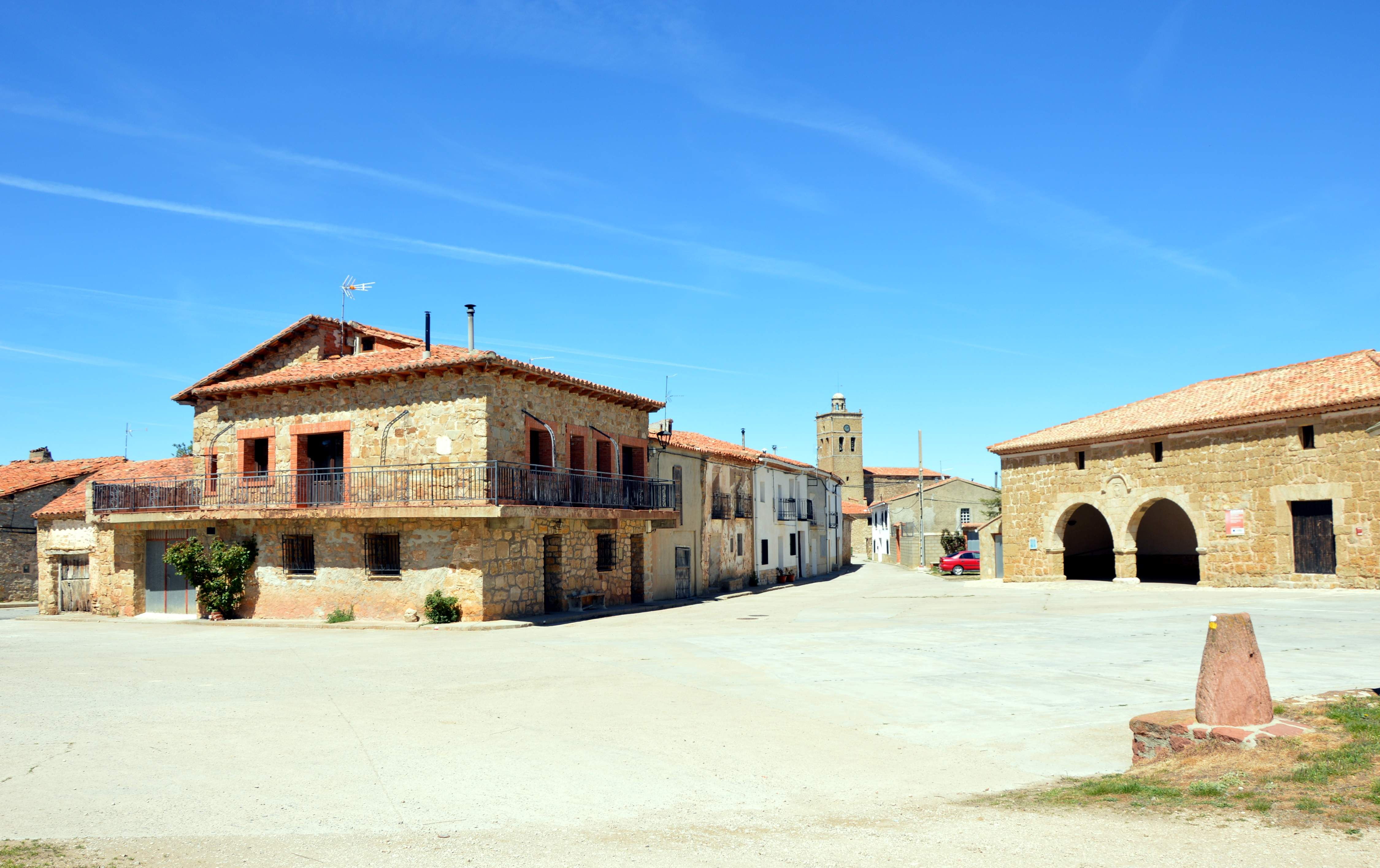 Vista parcial (meridional) del caserío de Jabaloyas (Teruel), con detalle de la Casa de los Diezmos (Lonja o Granero) a la derecha (2017).